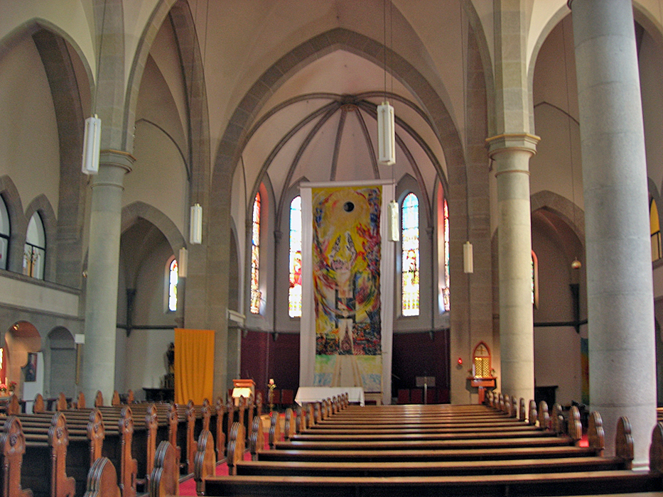 Pfarrkirche St. Georg in Gersthof, Wien